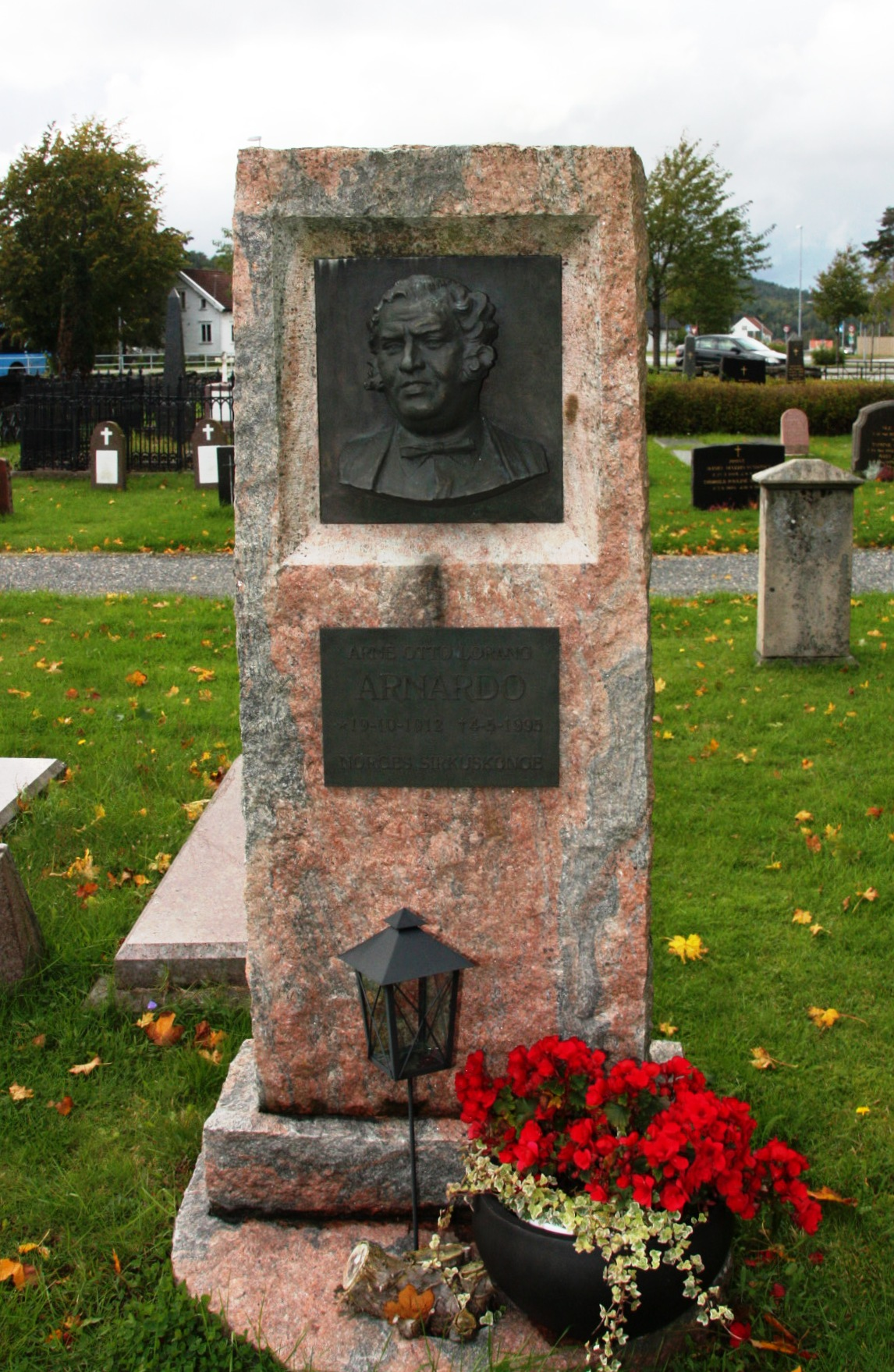 Arne Arnardos gravsted på Vestre Moland kirkegård